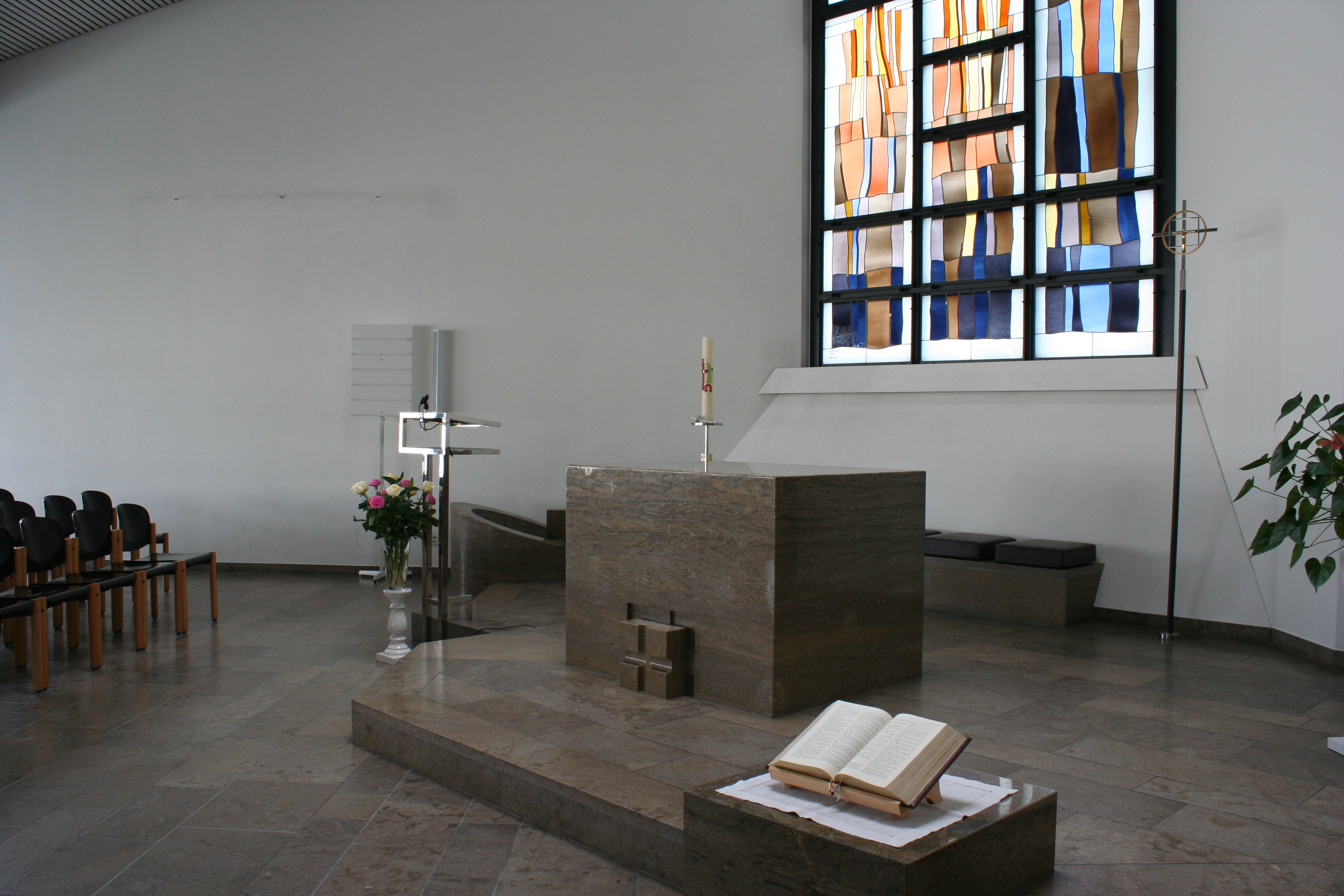 Römisch-katholische Kirche St. Franziskus Maur-Ebmatingen, Gestaltung von Georg Malin, Glasfenster von Fra Roberto Pasotti